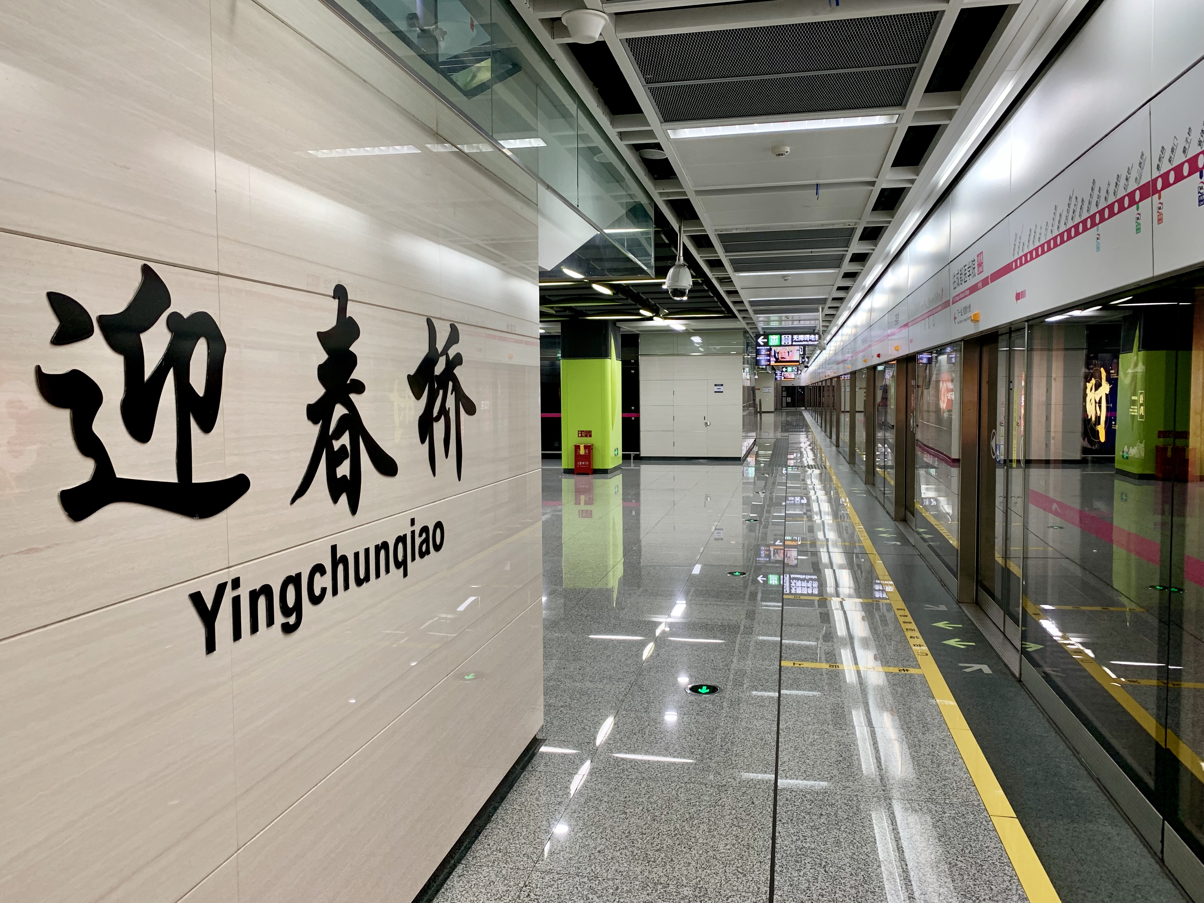 成都地铁迎春桥站